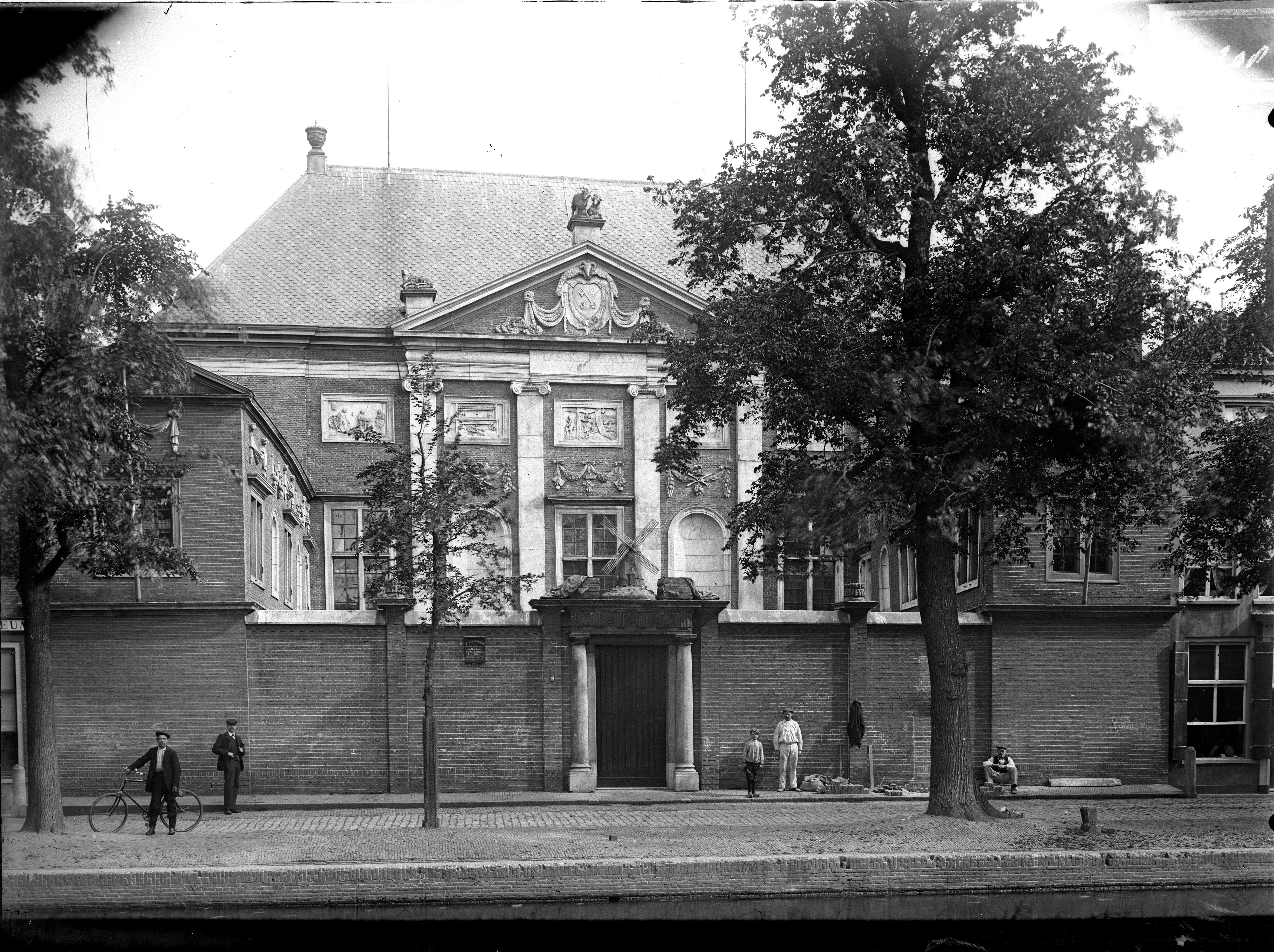 Gezicht op de Lakenhal aan de Oude Singel.